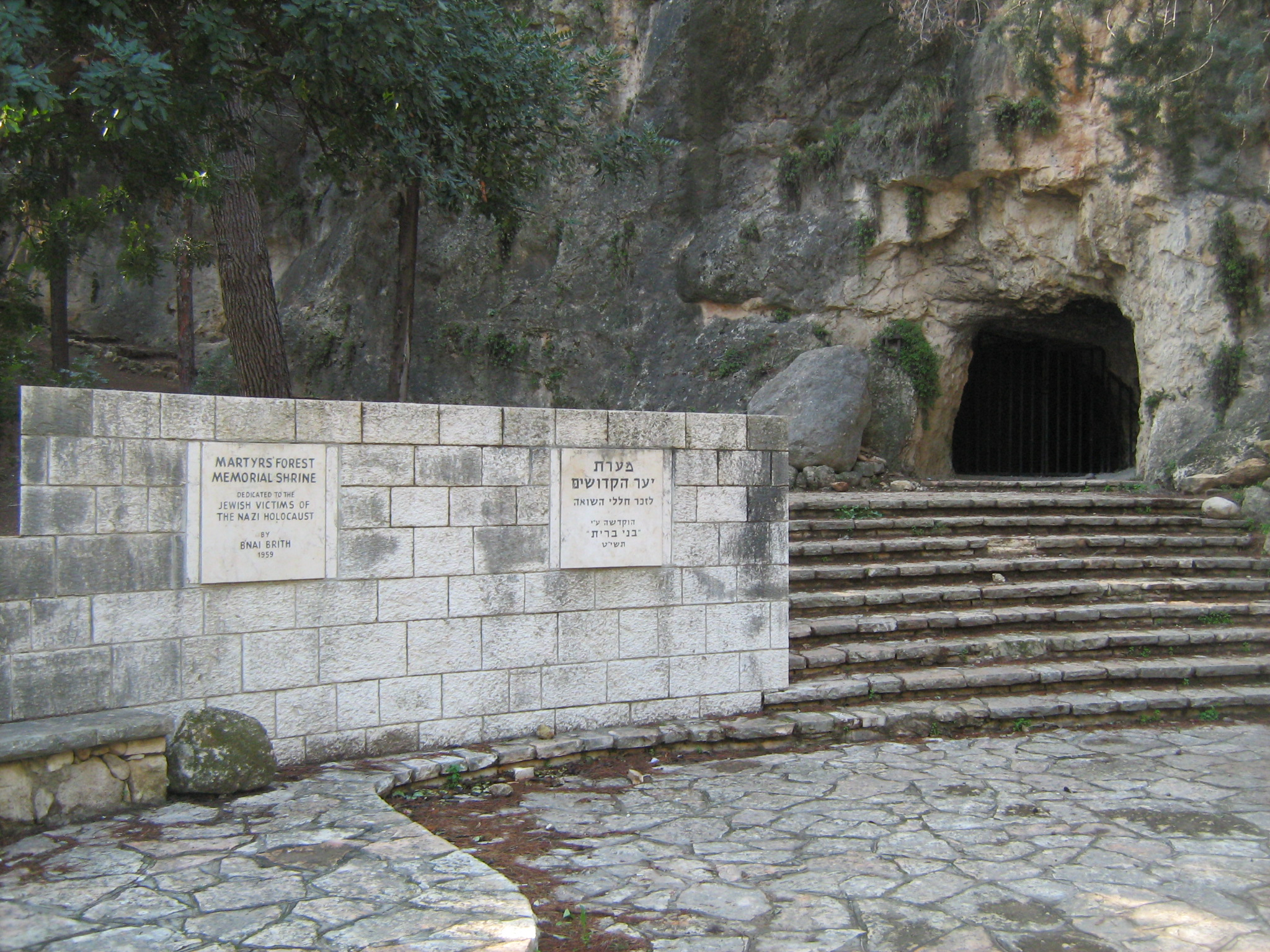 מערת בני ברית